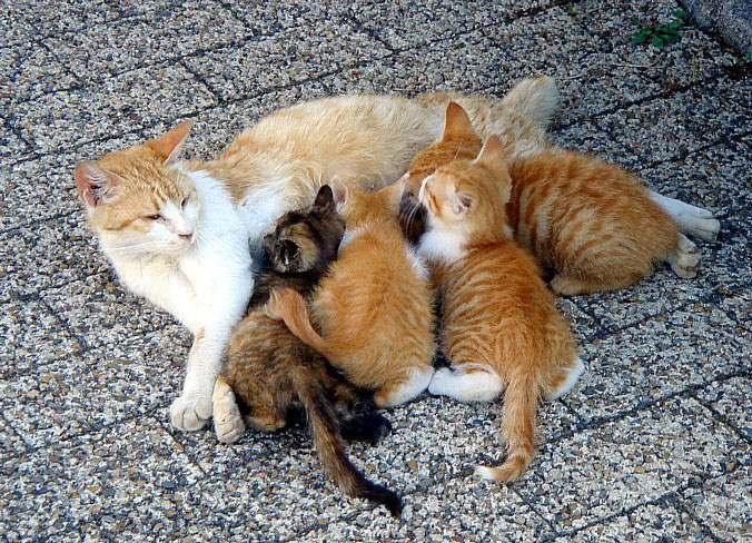 Cats, Kitten